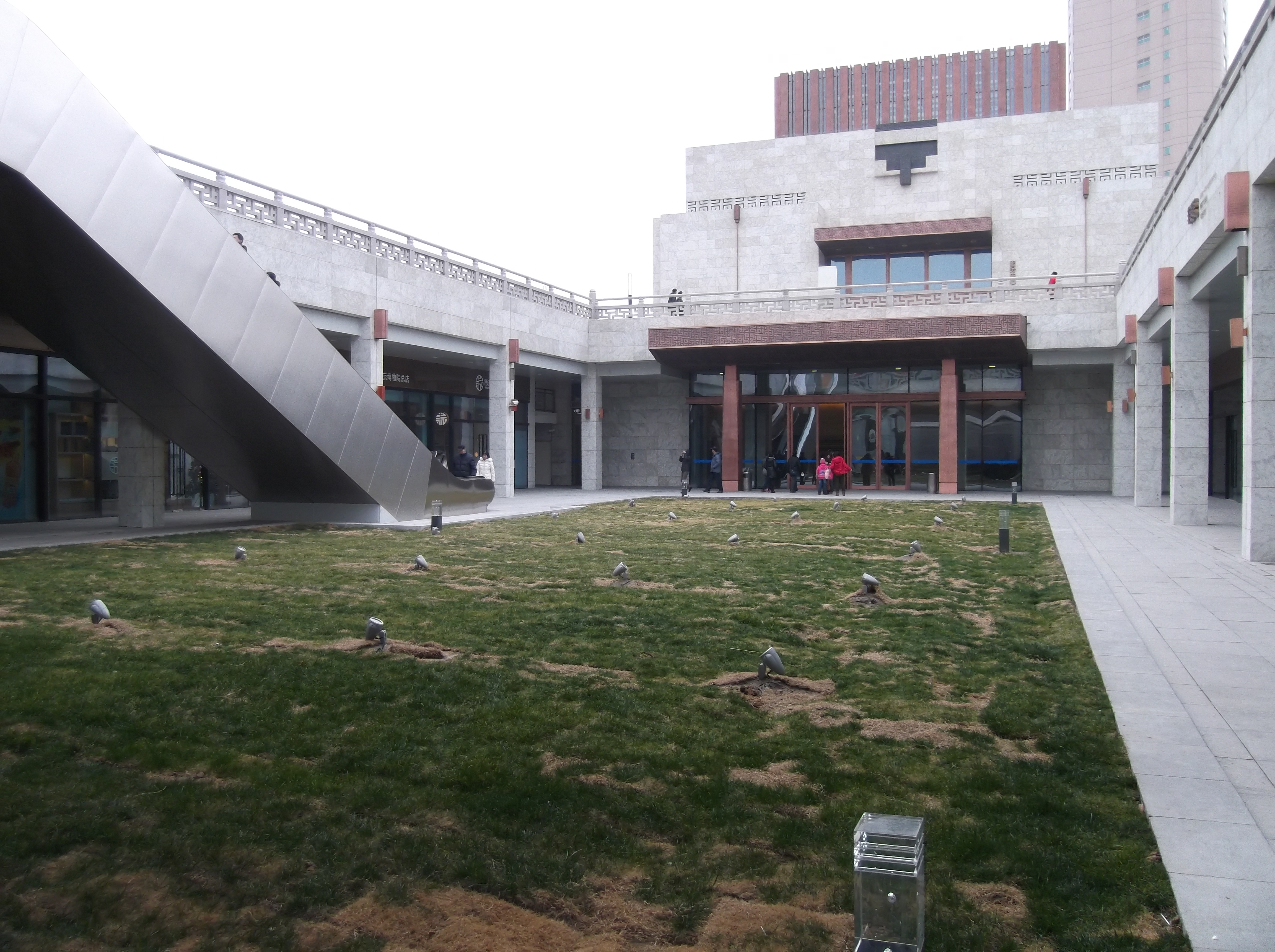 Xuanwu, Nanjing, Jiangsu, China